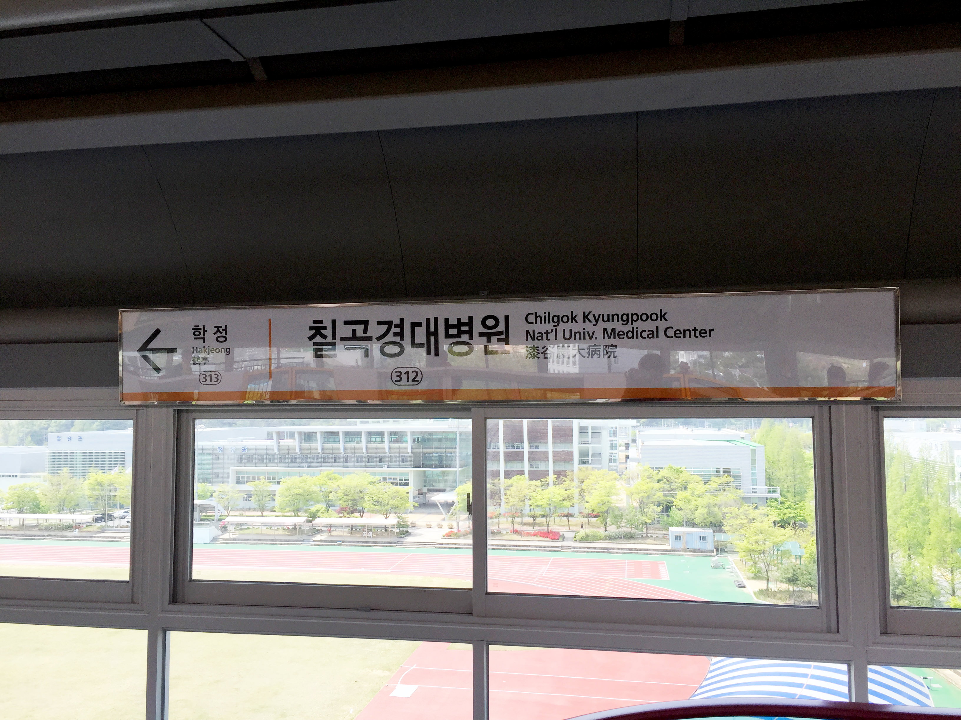 칠곡경대병원역 역명판